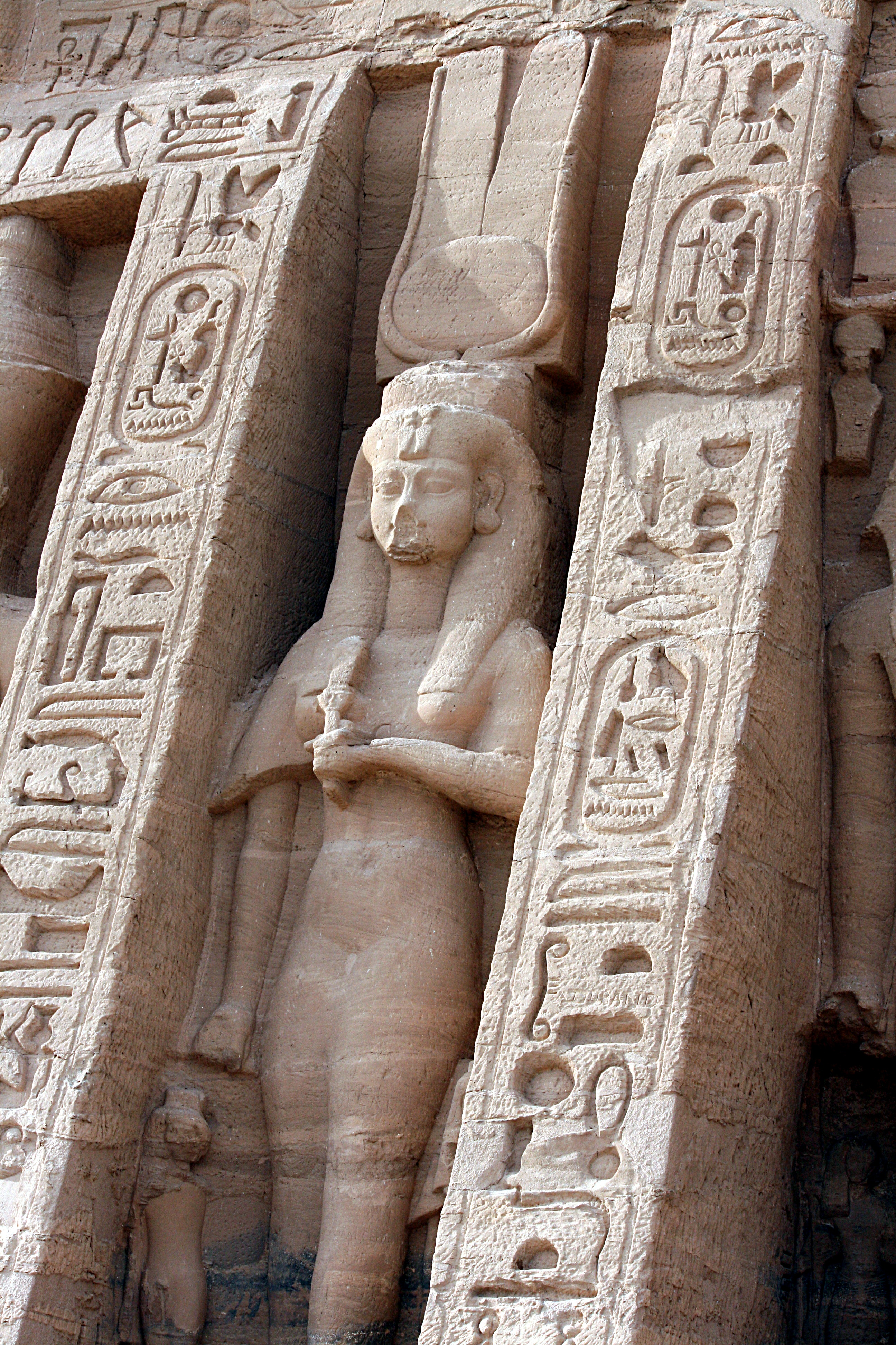 Abu_Simbel,_Kleiner_Tempel